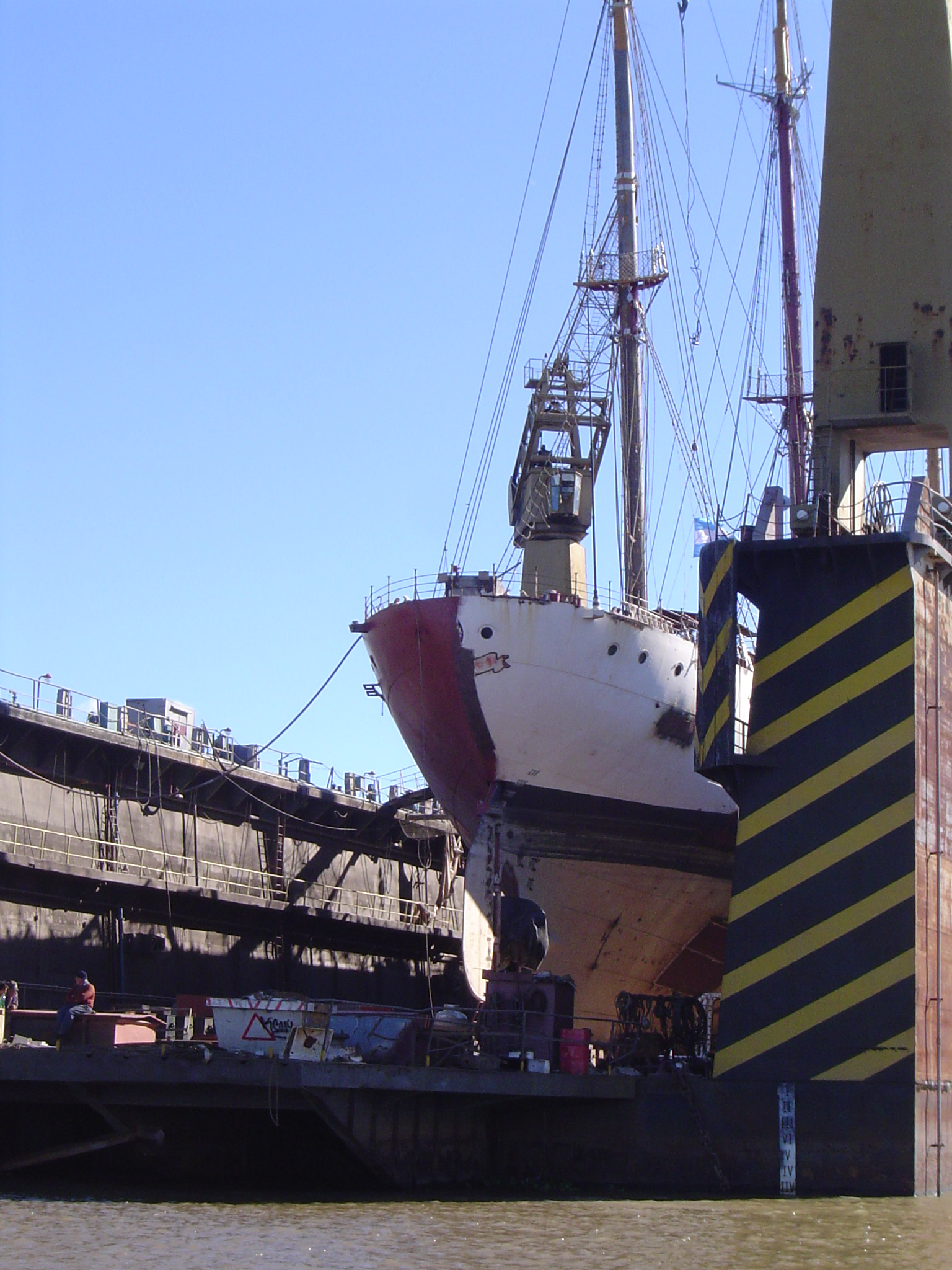 Fragata Libertad en reparaciones en el Astillero Rio Santiago.